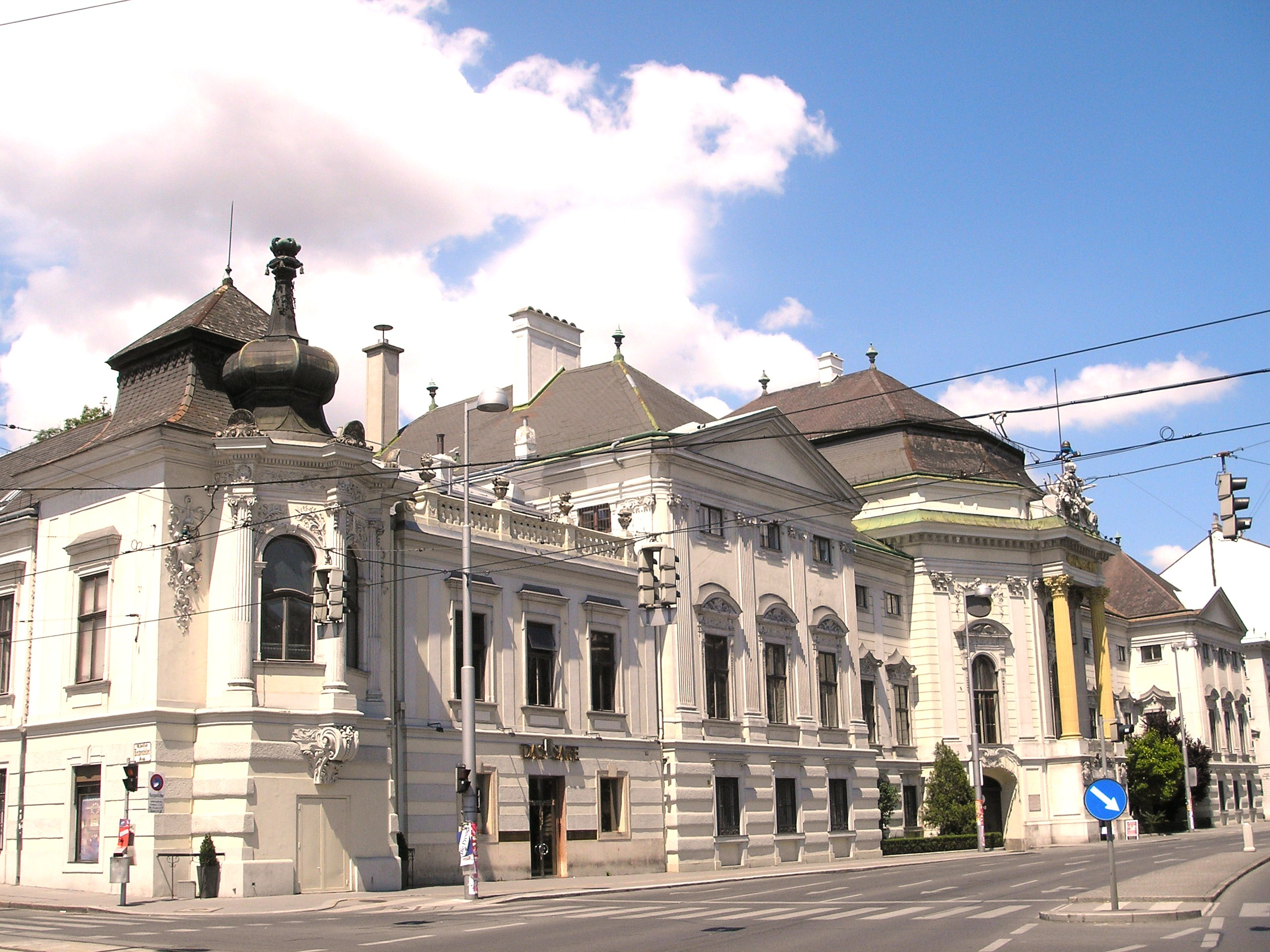 Palais Auersperg in Vienna